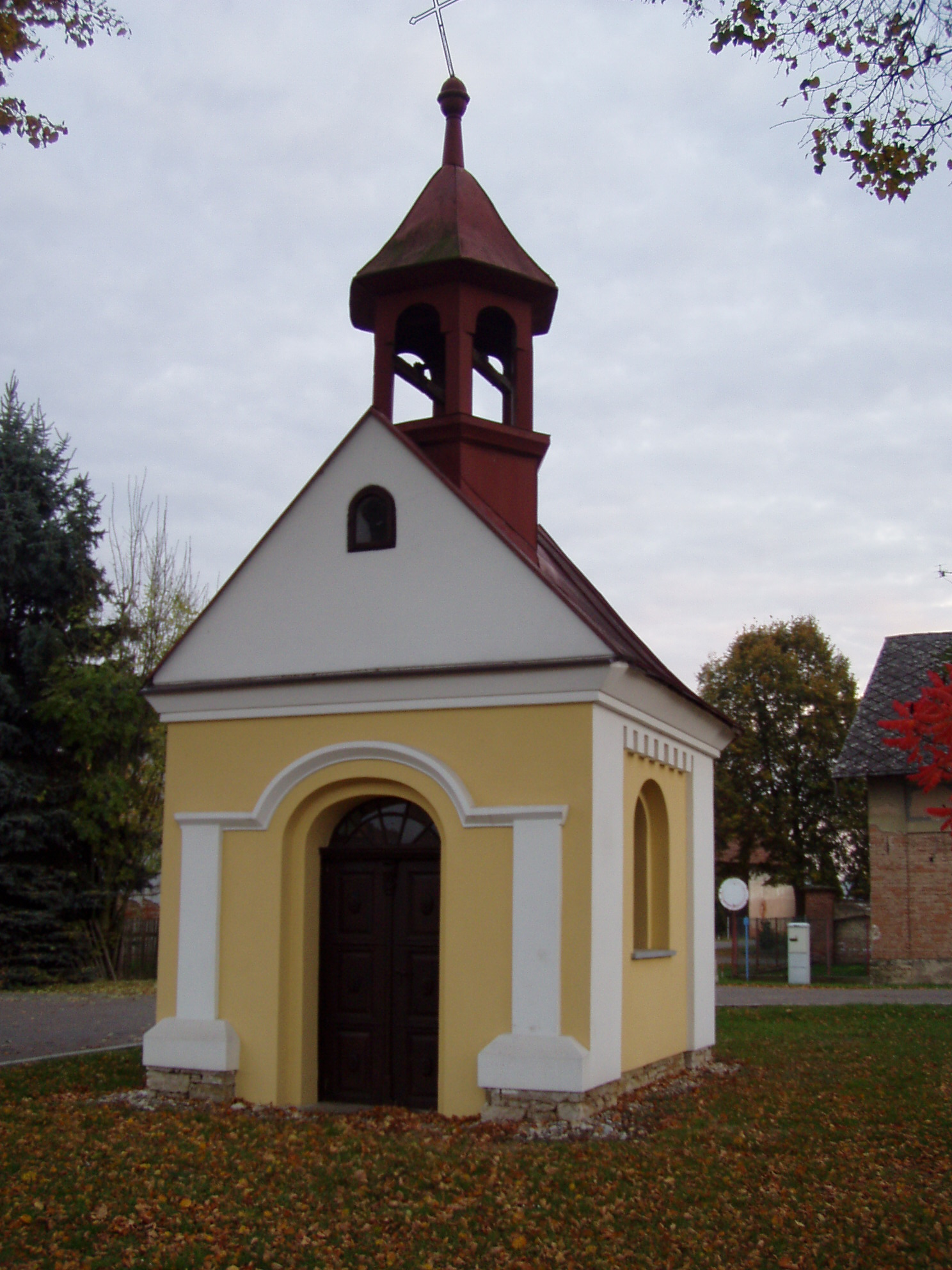 Kaple v Městci